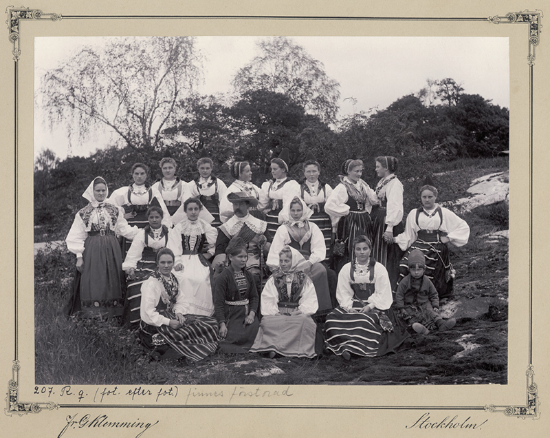 depicted place: Stockholm, Stockholm, Stockholm, Skansen, Djurgården (Sverige (SE))